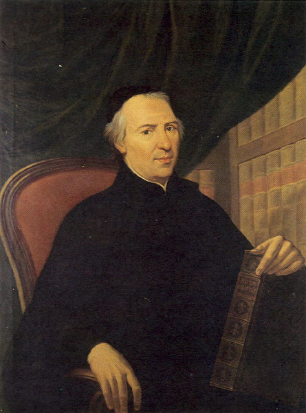 Odoardo Corsini (1702-1765), religioso, matematico e filosofo italiano.